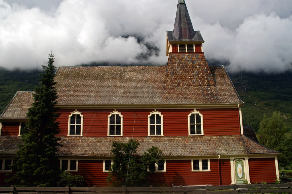 Olden kyrkje